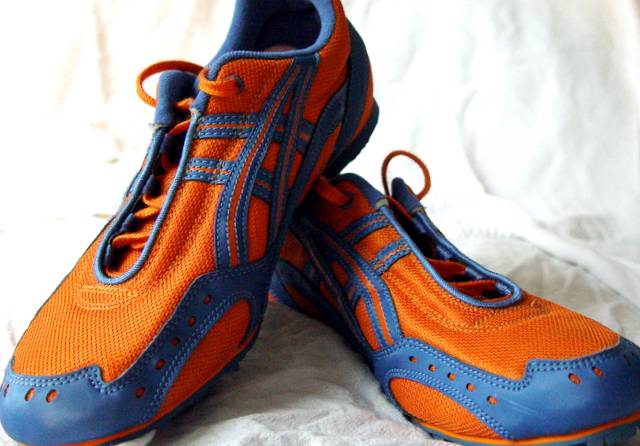 Et par brugte ASICS sko.